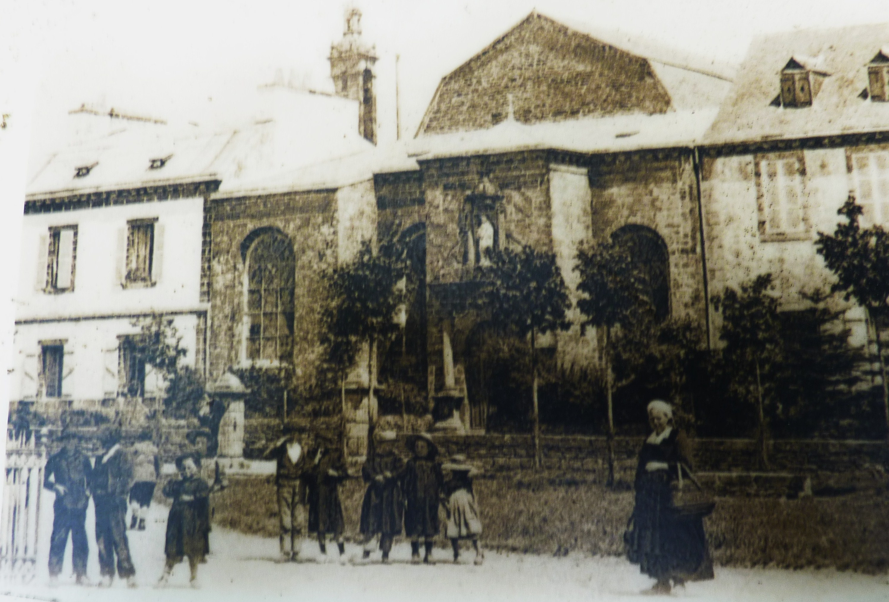 Carhaix-Plouguer : Le couvent des Hospitalières au début du XXe siècle (l'emplacement est occupé actuellement par la poste)